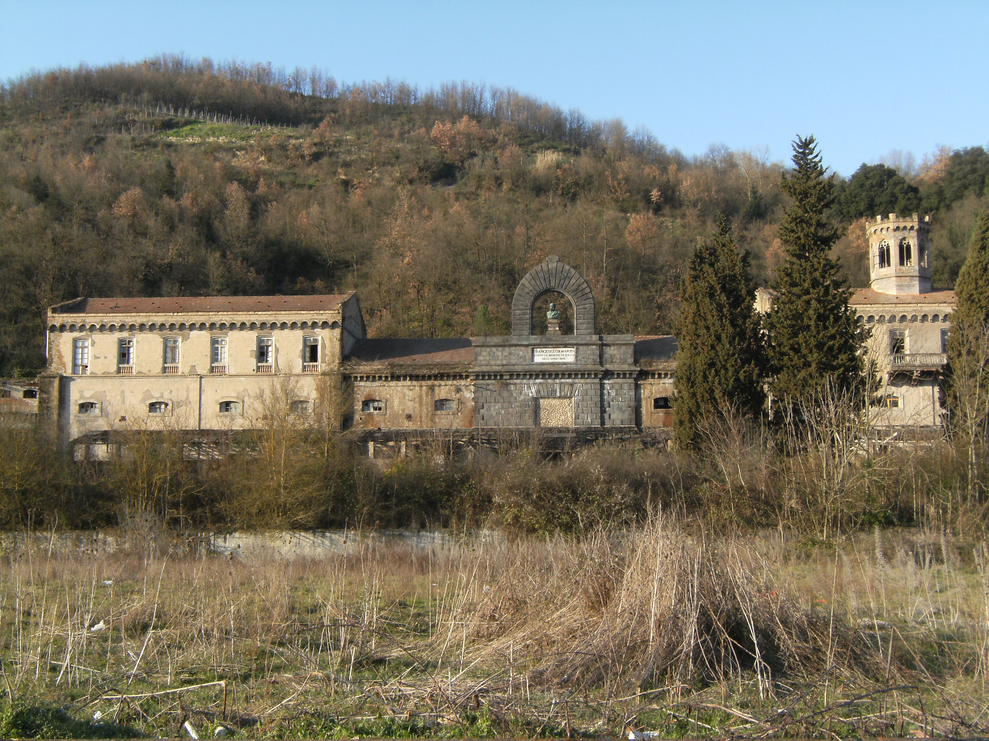 Vista Miniere di Zolfo a Tufo (AV)